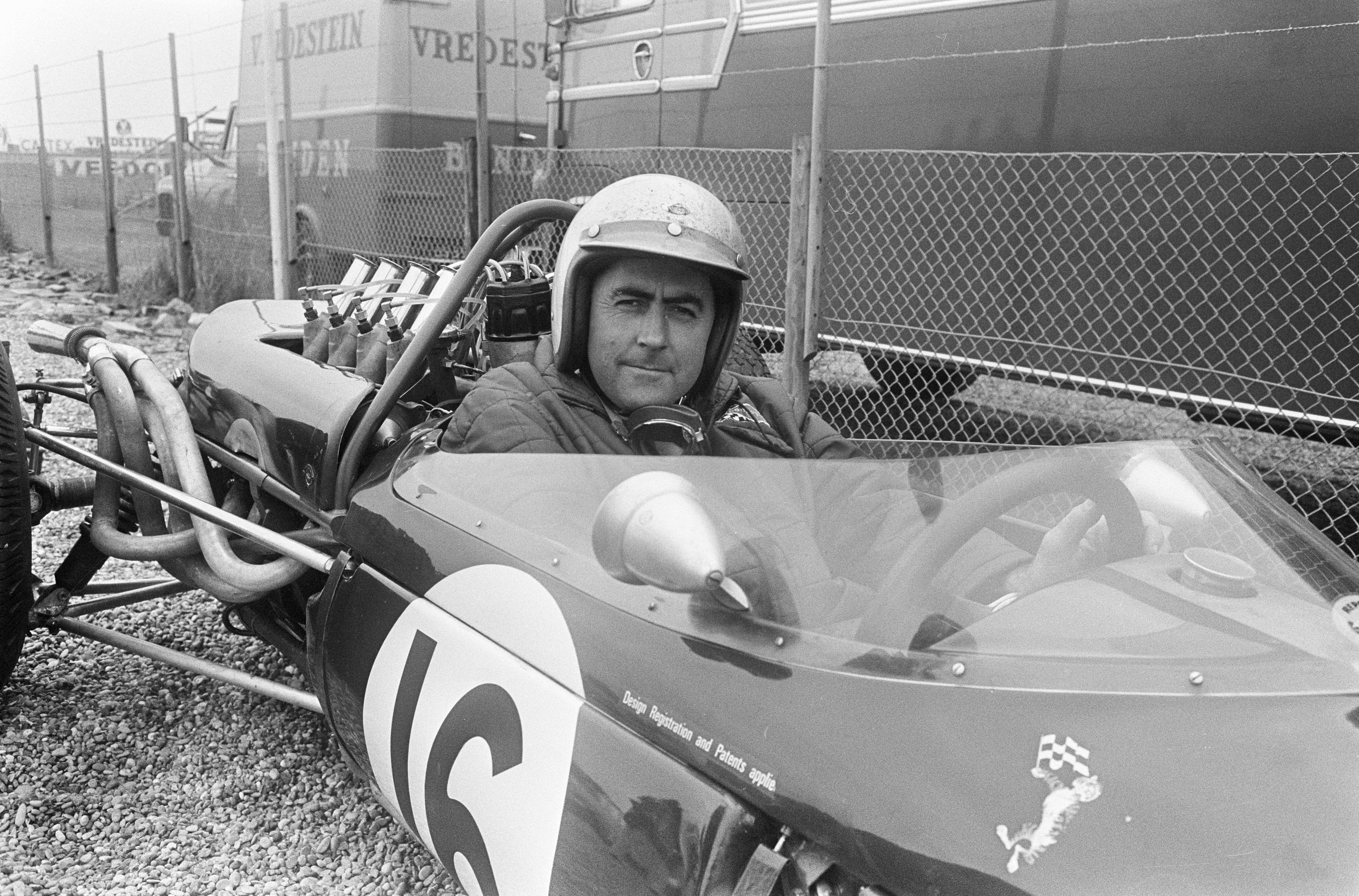 Grand Prix Zandvoort , tijdens training.